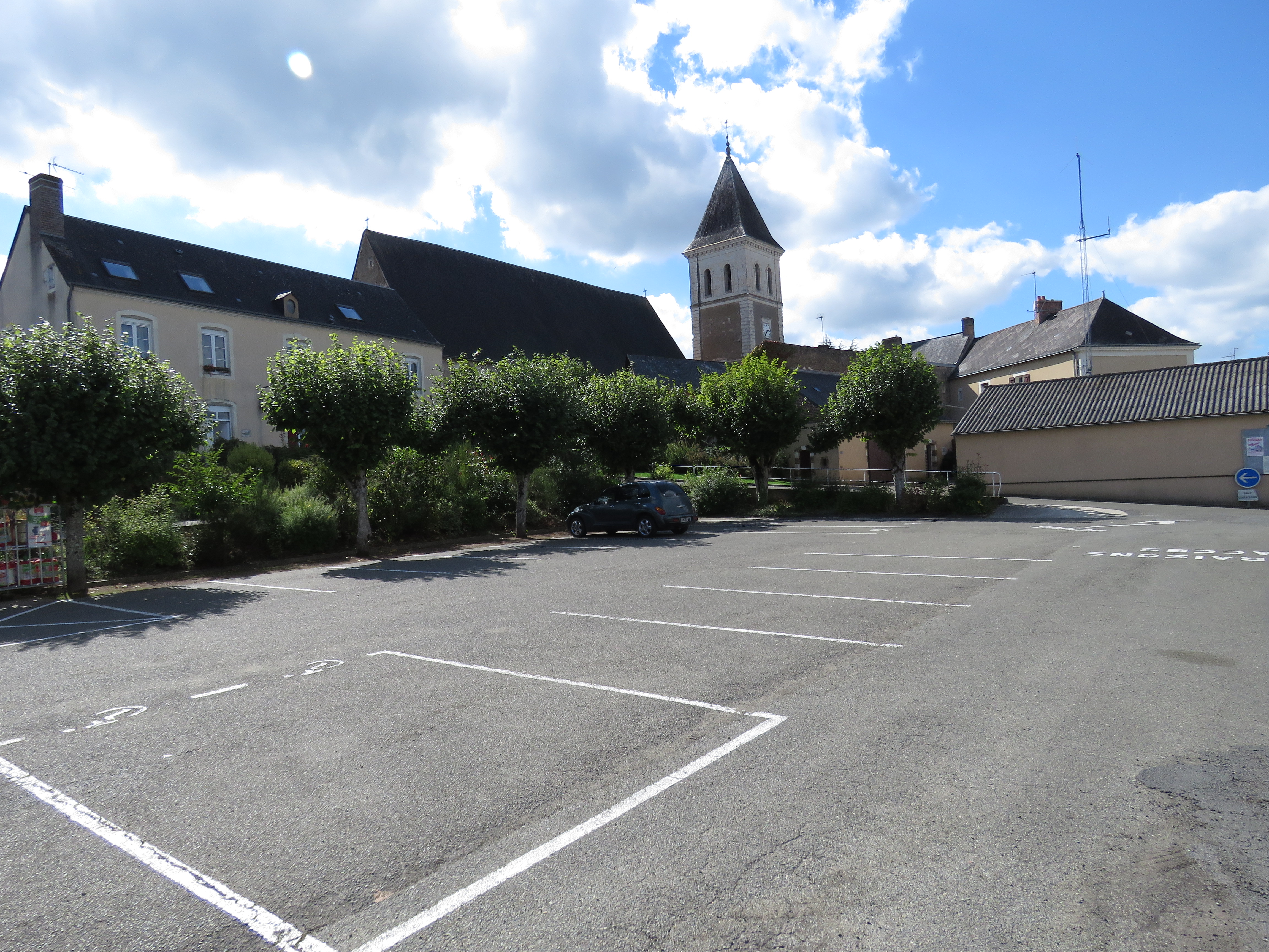 Vue du sud-est.